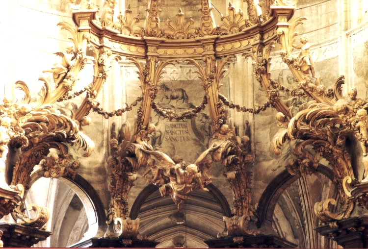 Ciborium, église abbatiale Sainte-Trinité de Fécamp, France.